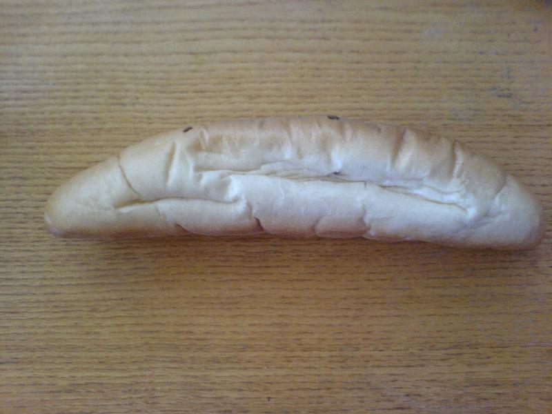 pecivo (pastery) rohlik